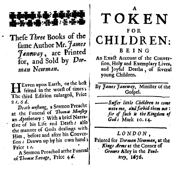 Janeway, James, 1636?-1674. A token for children being an exact account of the conversion, holy and exemplary lives and joyful deaths of several young children by James Janeway. (London: Printed for Dorman Newman, 1676).